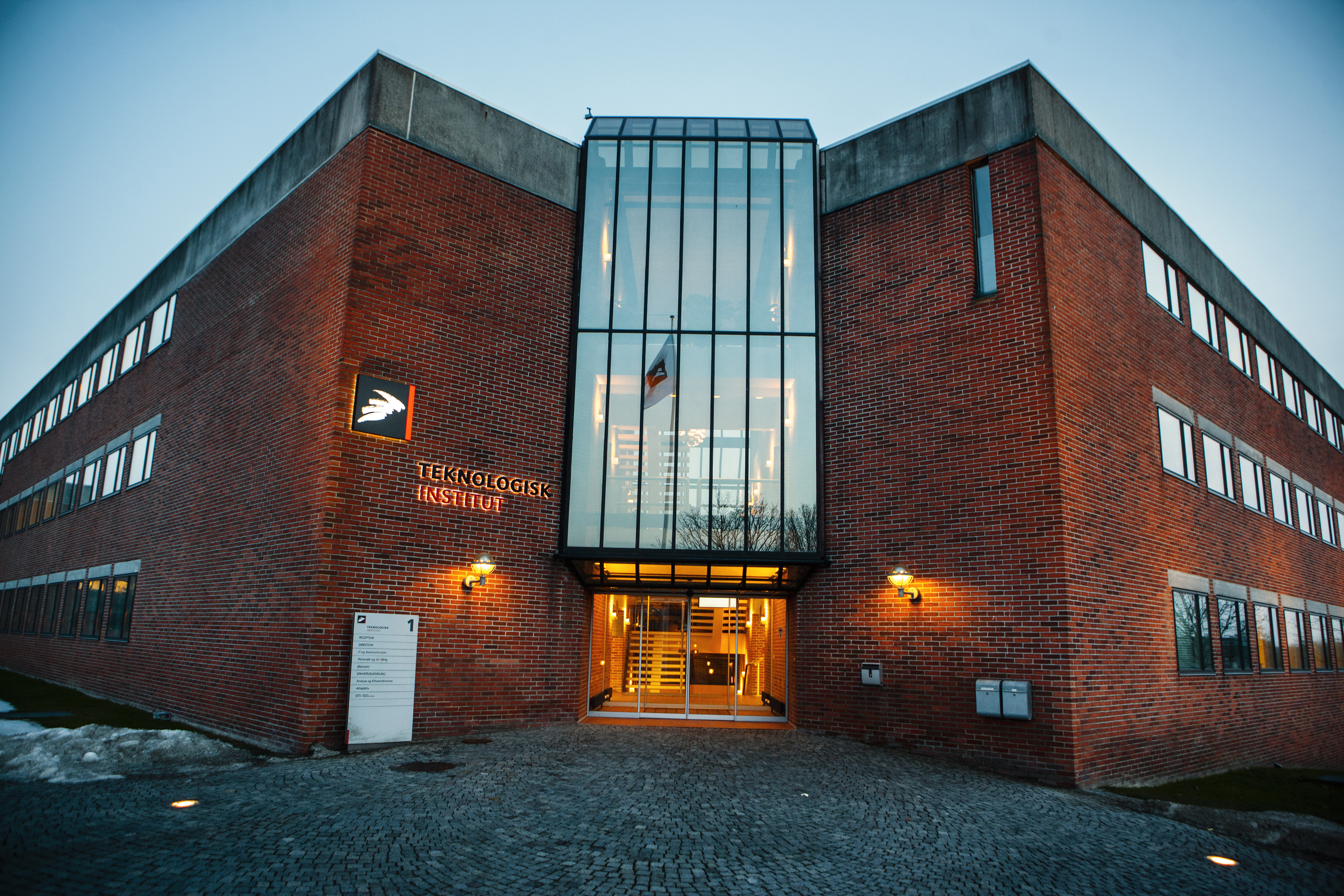 Teknologisk Institut hovedsæde i Taastrup, Danmark